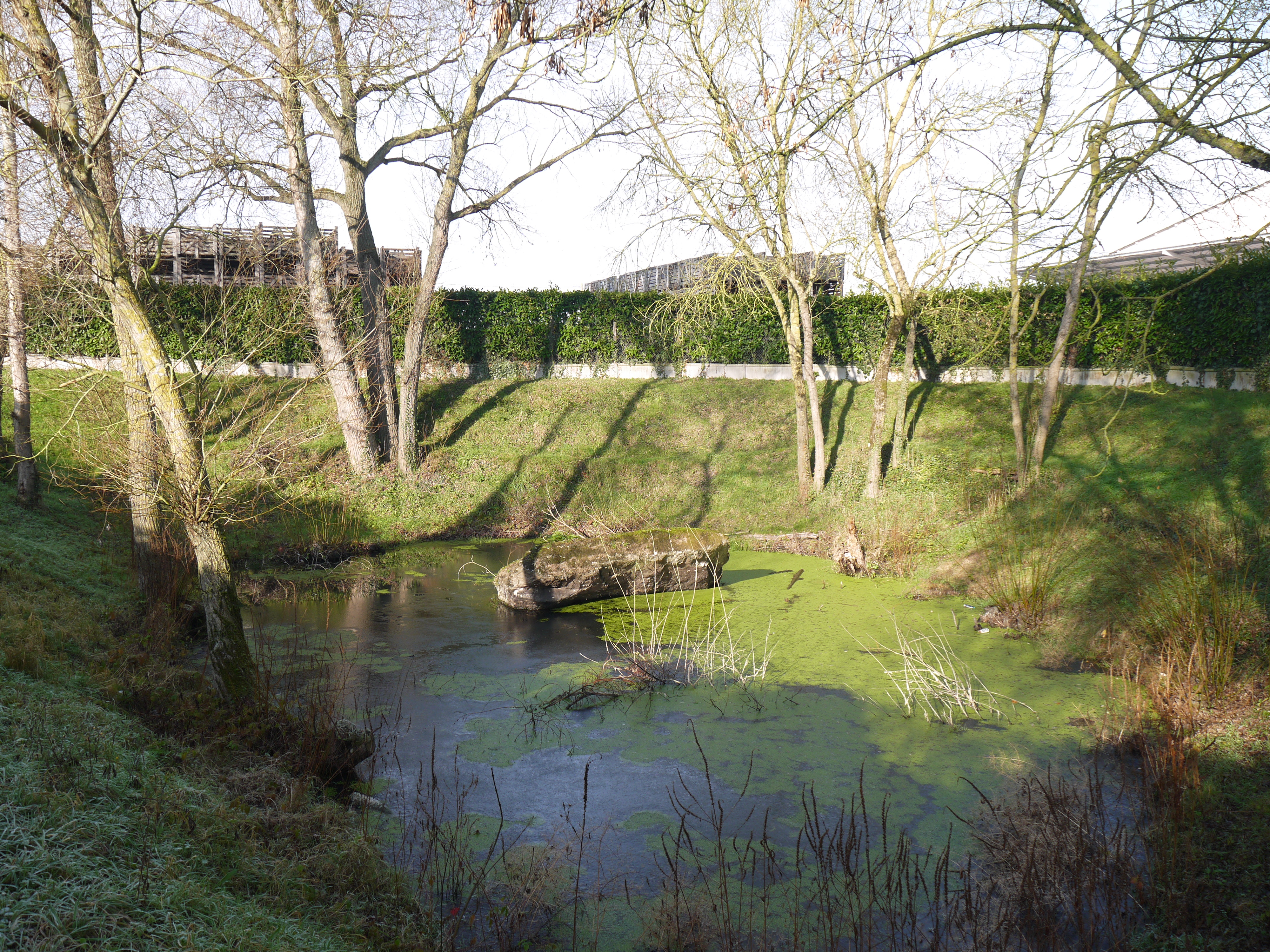 Dolmen de la Pierre Couvretière - vue 5